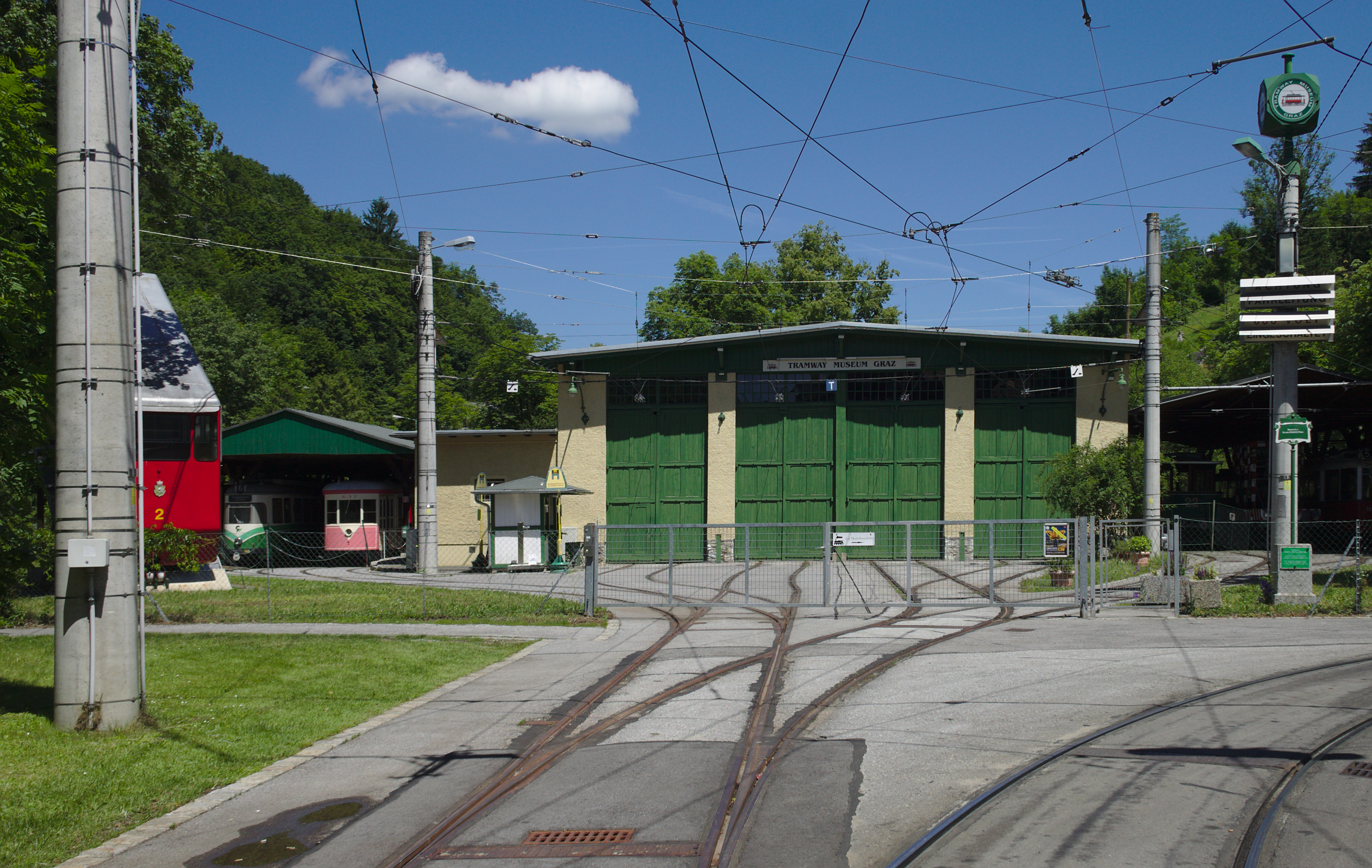 Straßenbahnremise, Tramway-Museum-Graz